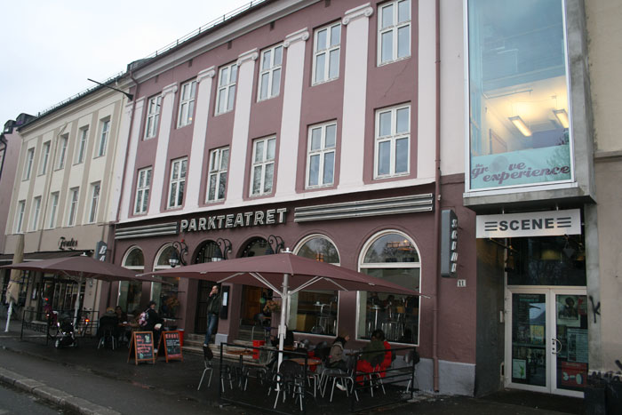 Parkteatret in Oslo